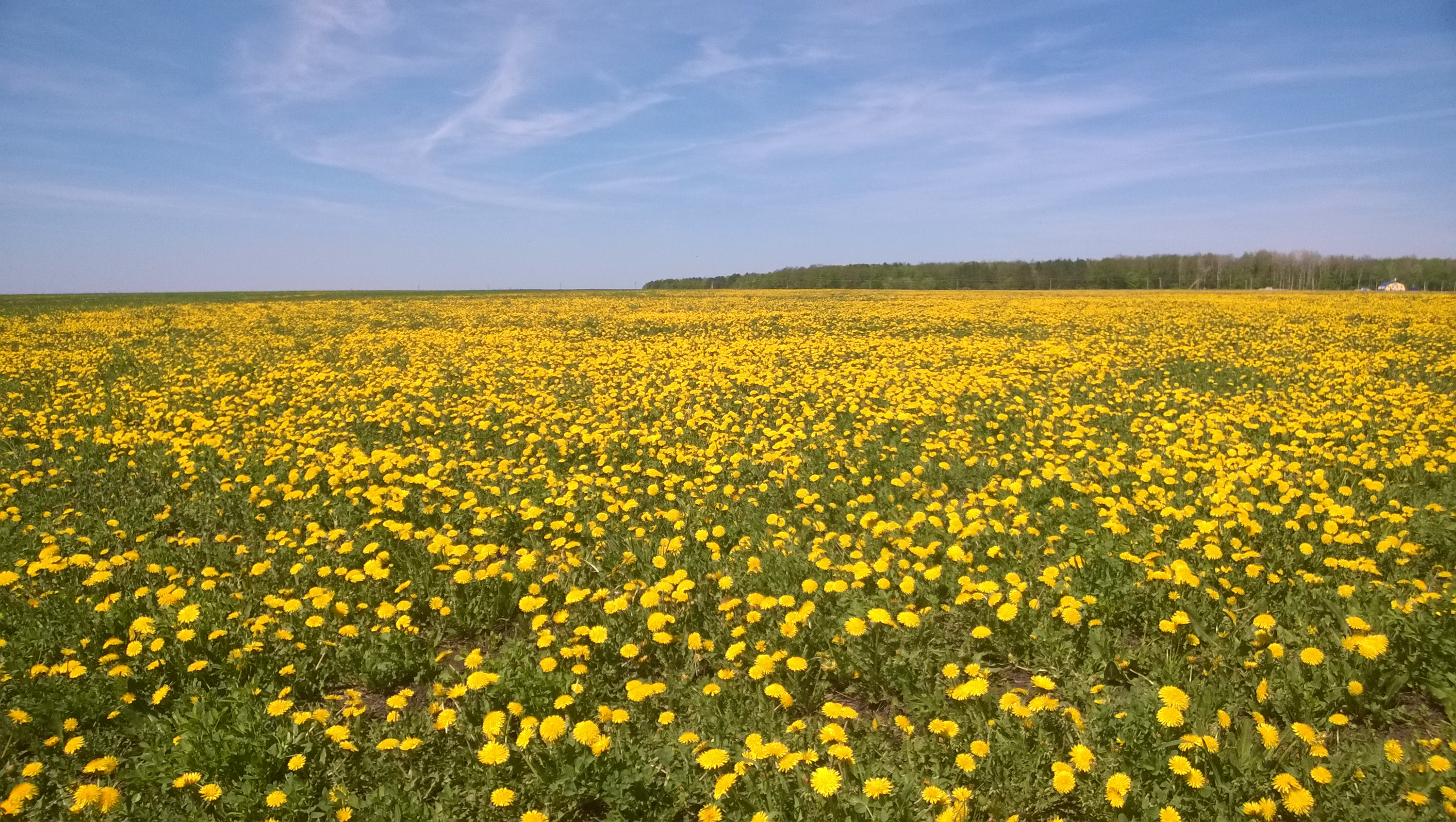 Желтое море. Чистопольский р-н. РТ. Май 2014